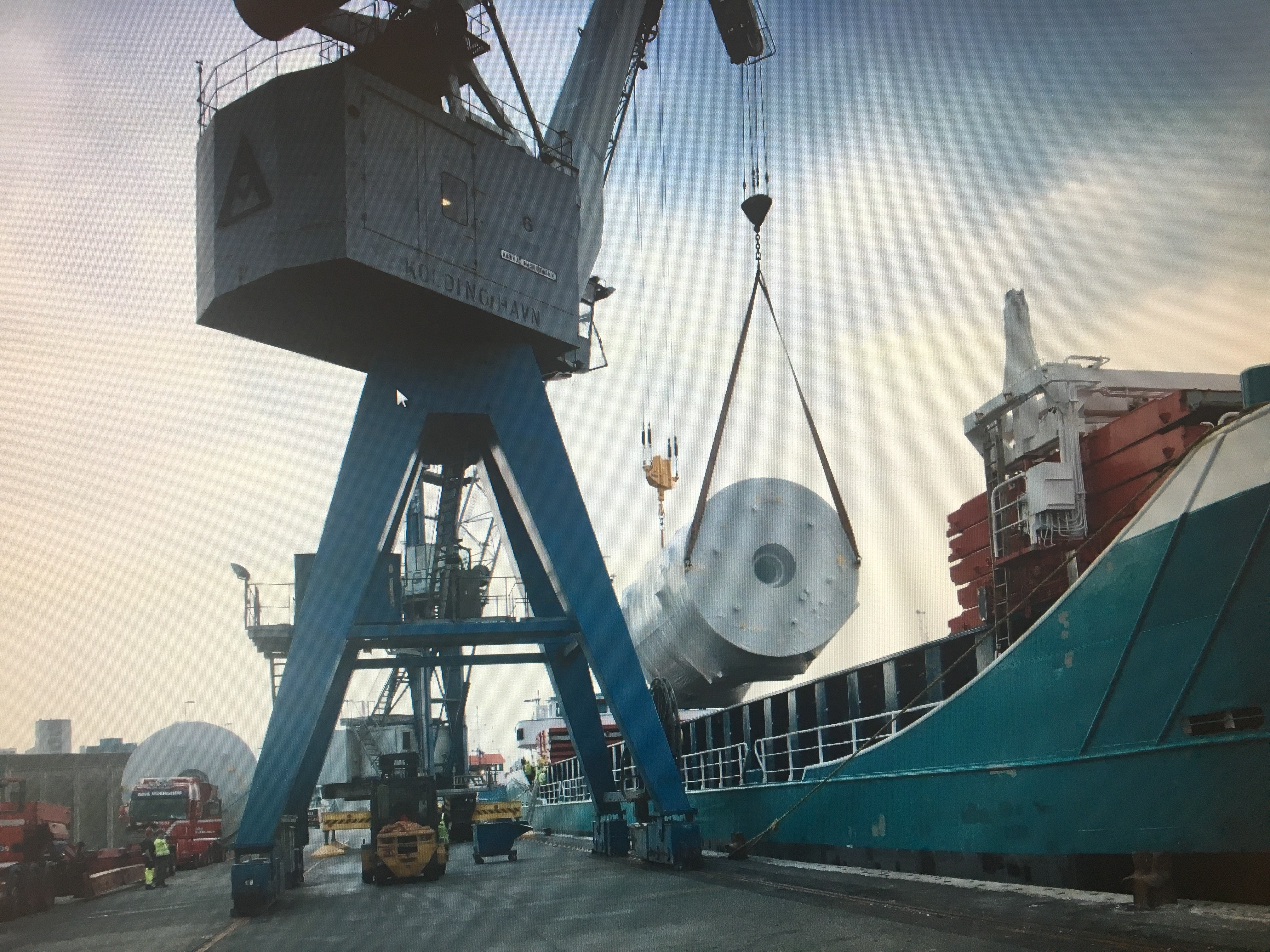 Læsning af vindmøllekomponent